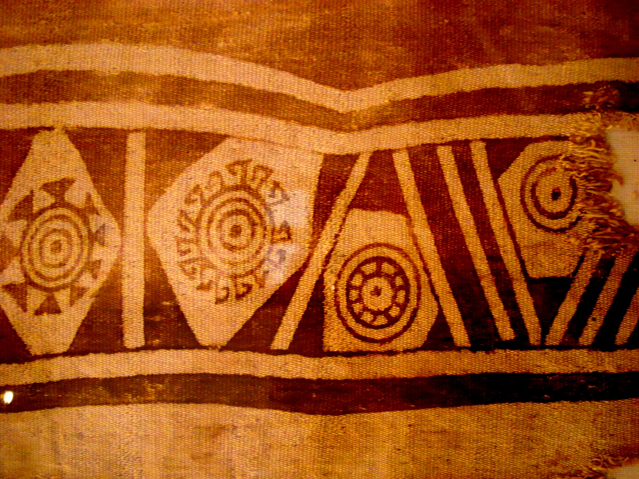 Tejido guane encontrado en la Mesa de los Santos, Santander